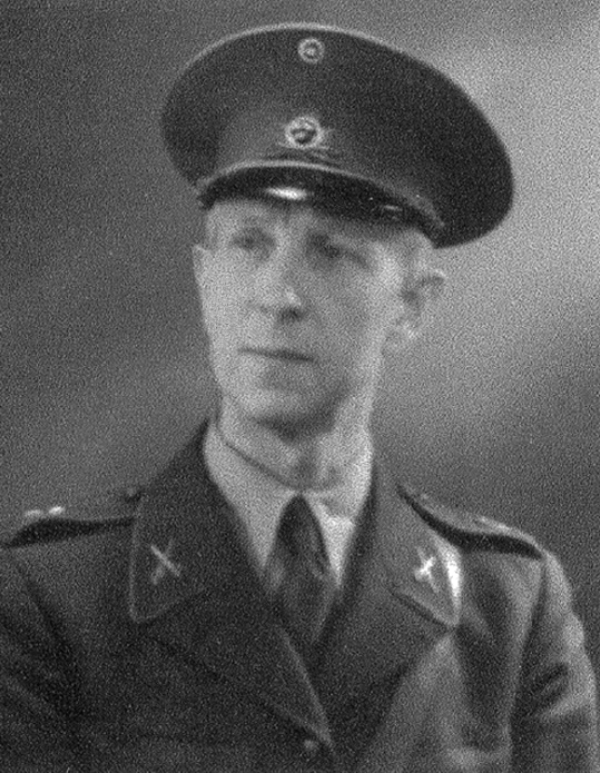 Anders Mårtensson